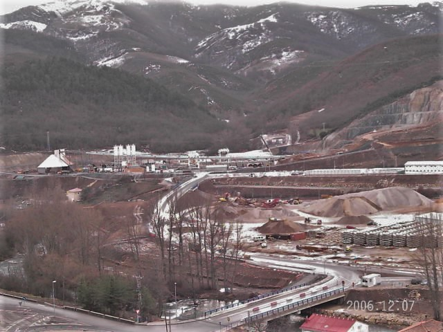 Obras del túnel de la variante de Pajares para el tren de alta velocidad Madrid-Gijón. La Pola de Gordón. León. España.